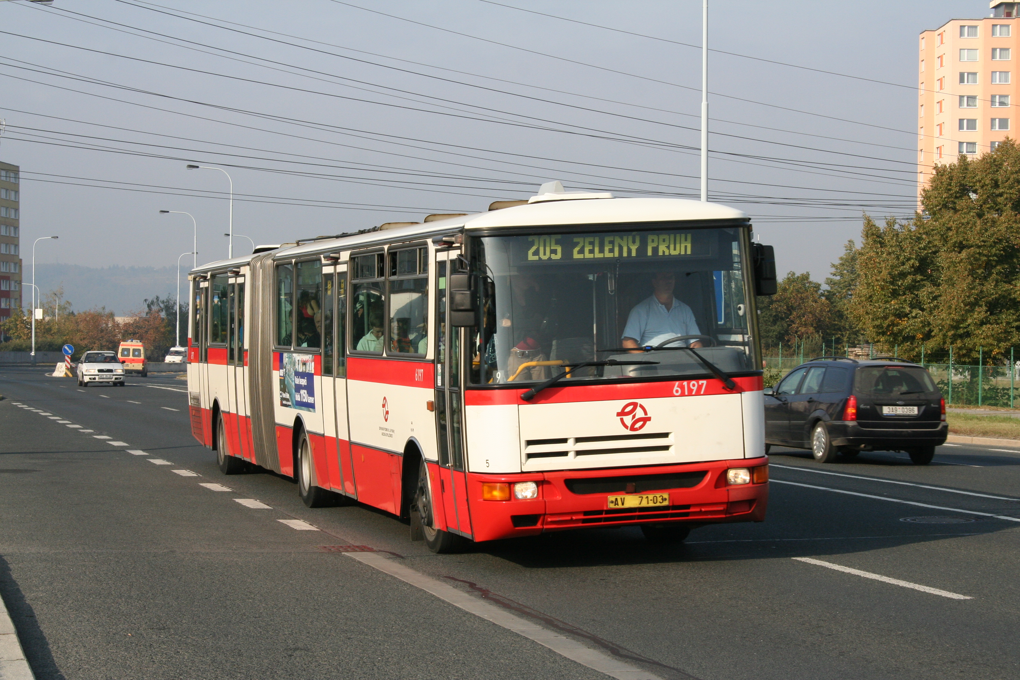 bus Karosa type B 941 (Prague, Czechia)